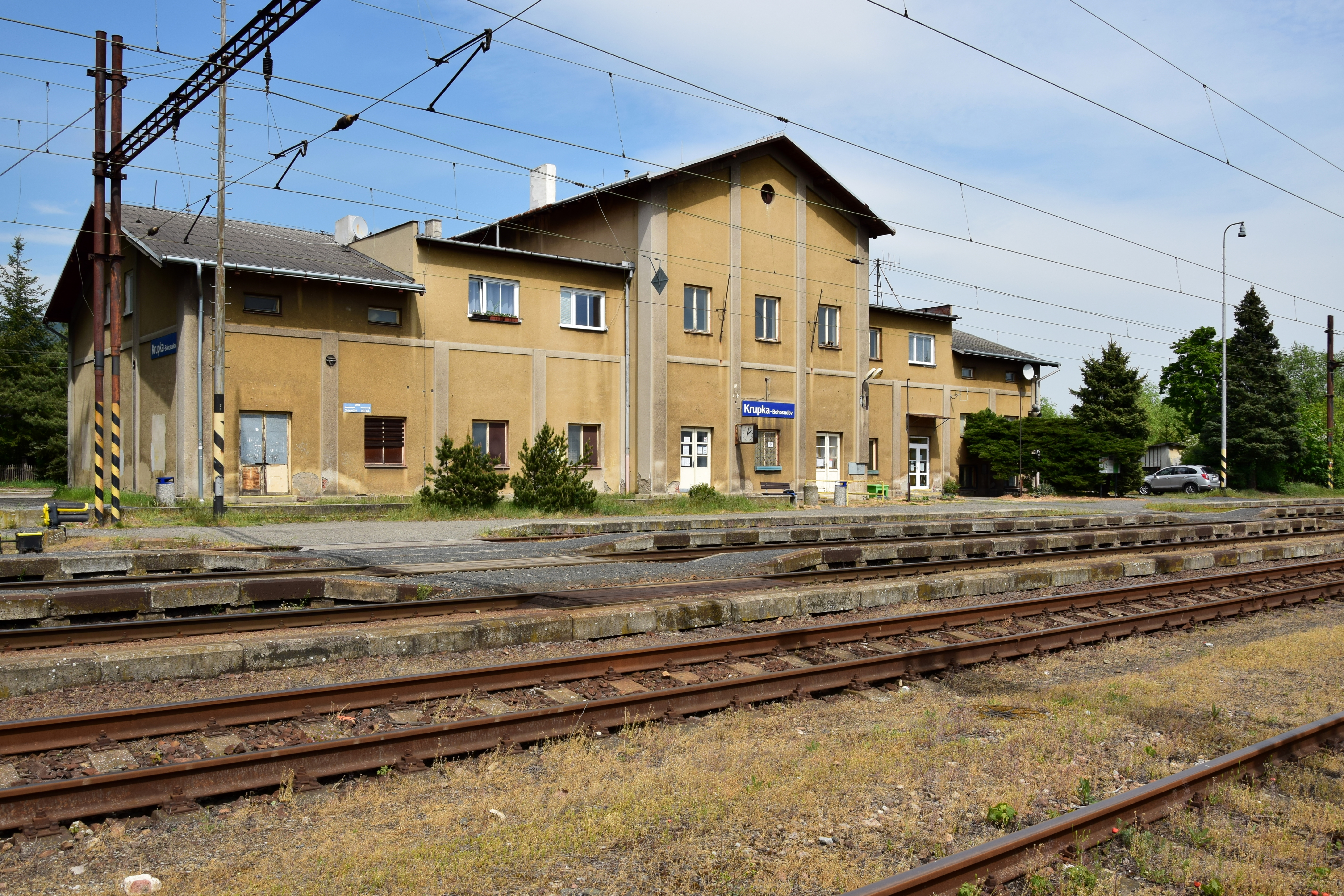 Železniční stanice Krupka-Bohosudov